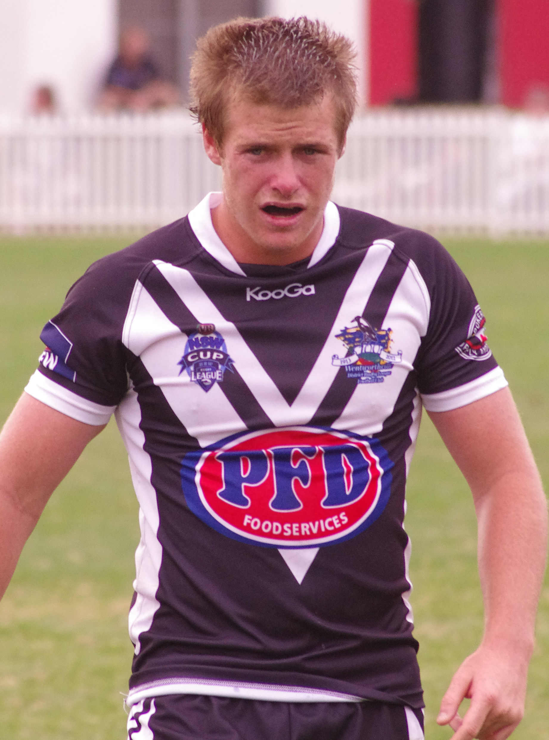 Jake Mullaney